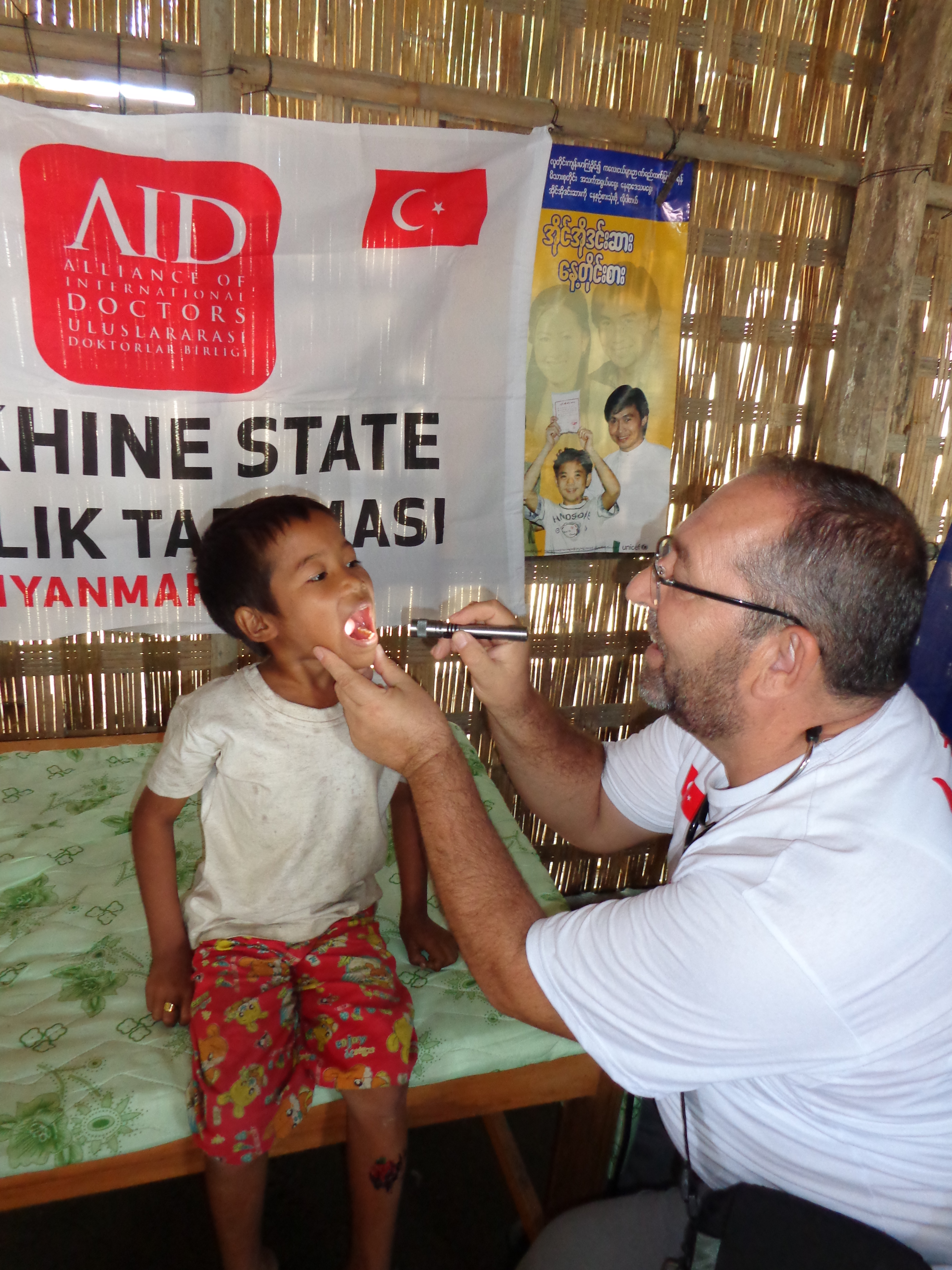 AID, Arakan'da değişik kamplarda sağlık taramaları gerçekleştirdi.